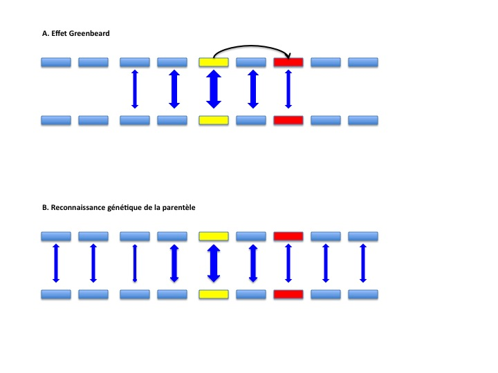 Schéma représentant la différence entre Kin-selection et Greenbeard